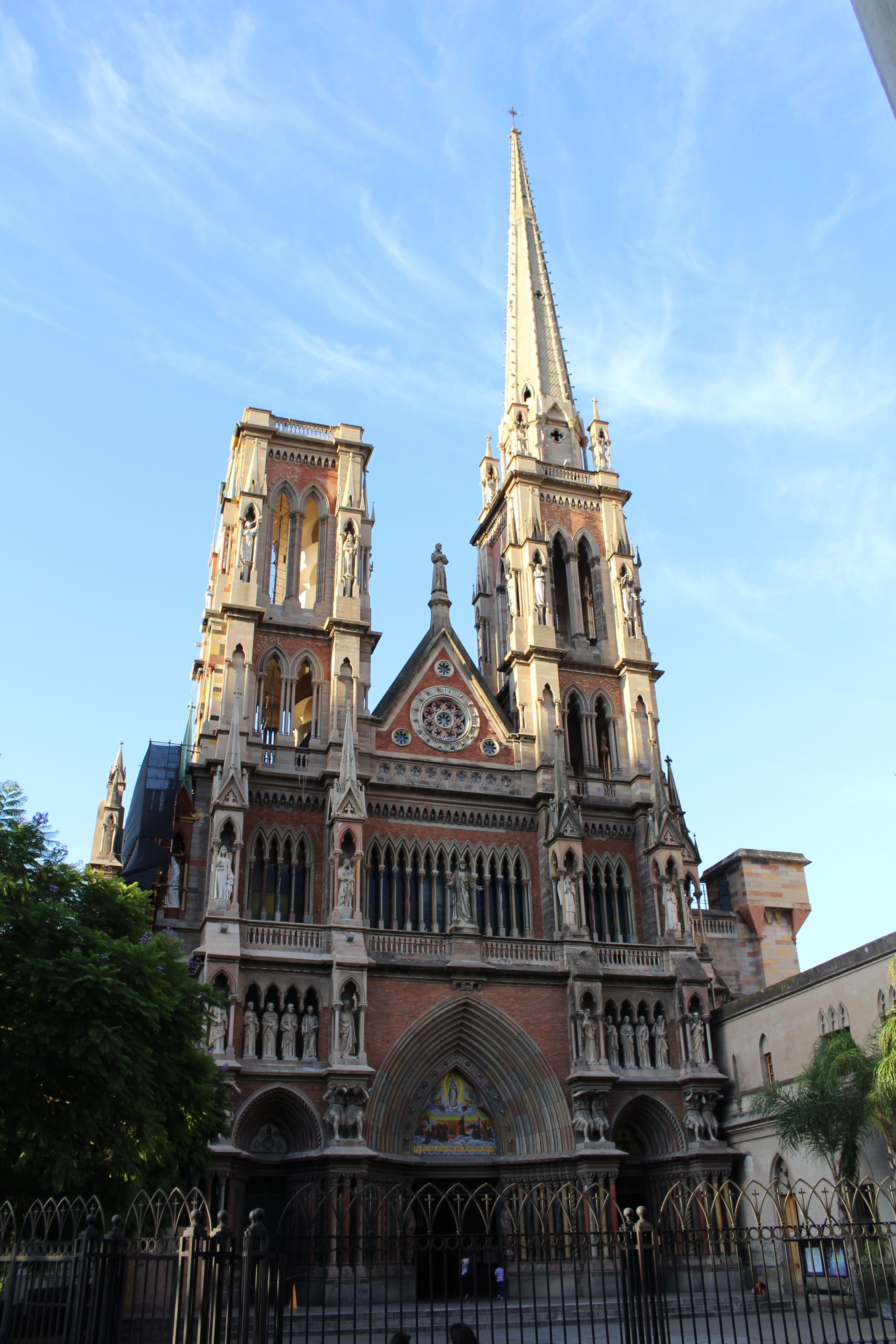 Iglesia Capuchinos - Frente completo